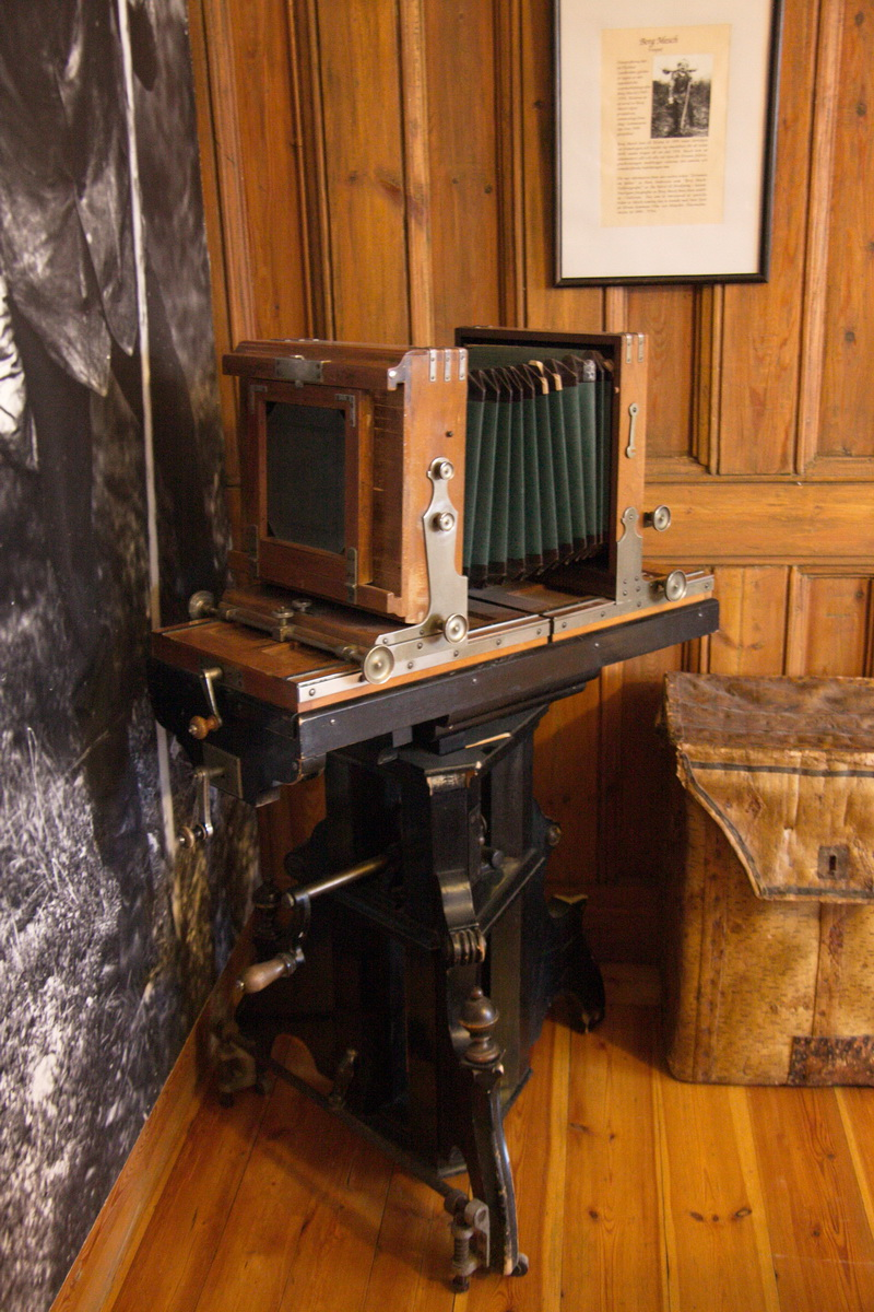 Càmera de fotos de Borg Mesch (Suècia), conservada a Hjalmar Lundbohmsgården, a Kiruna